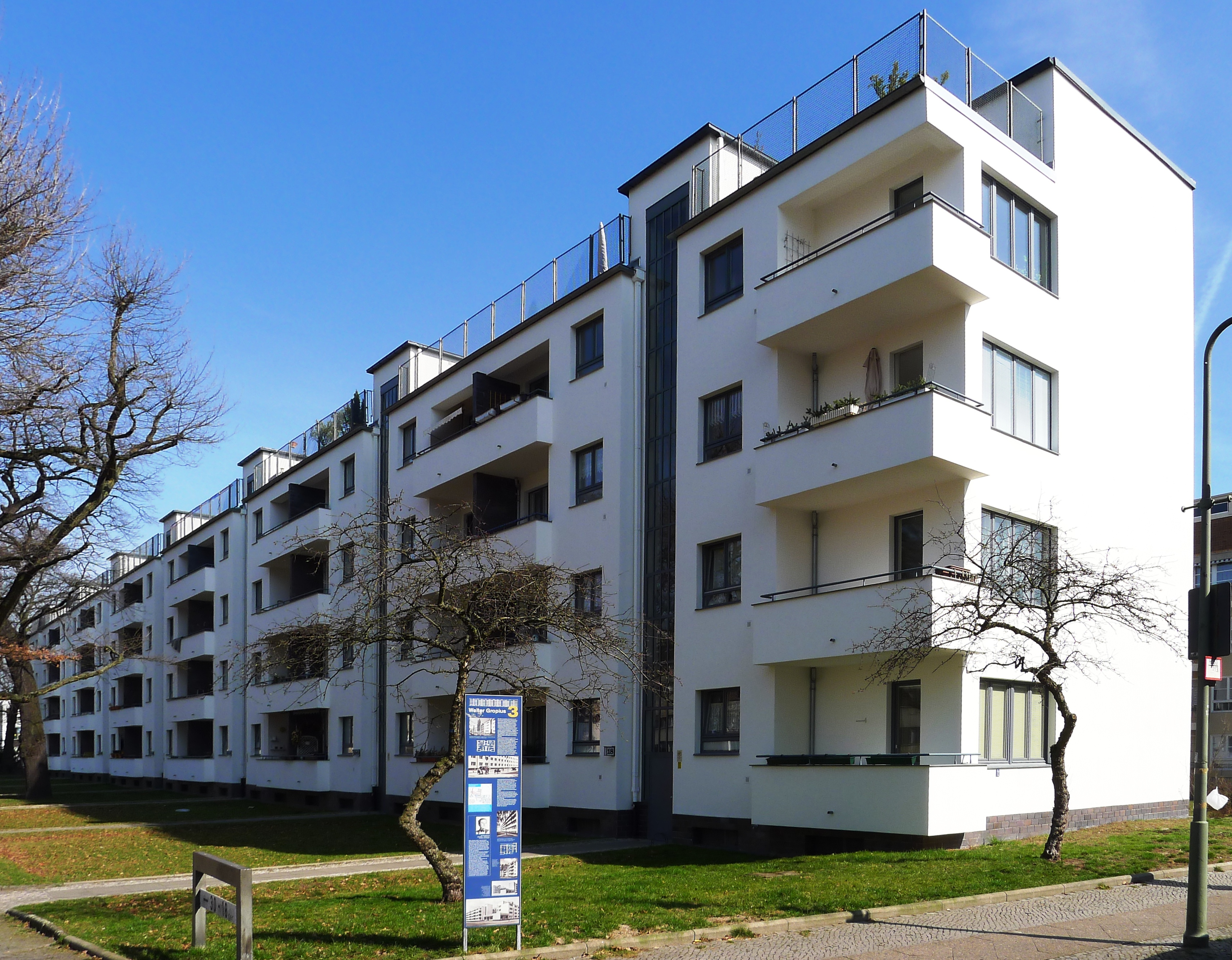 Zeilenbau